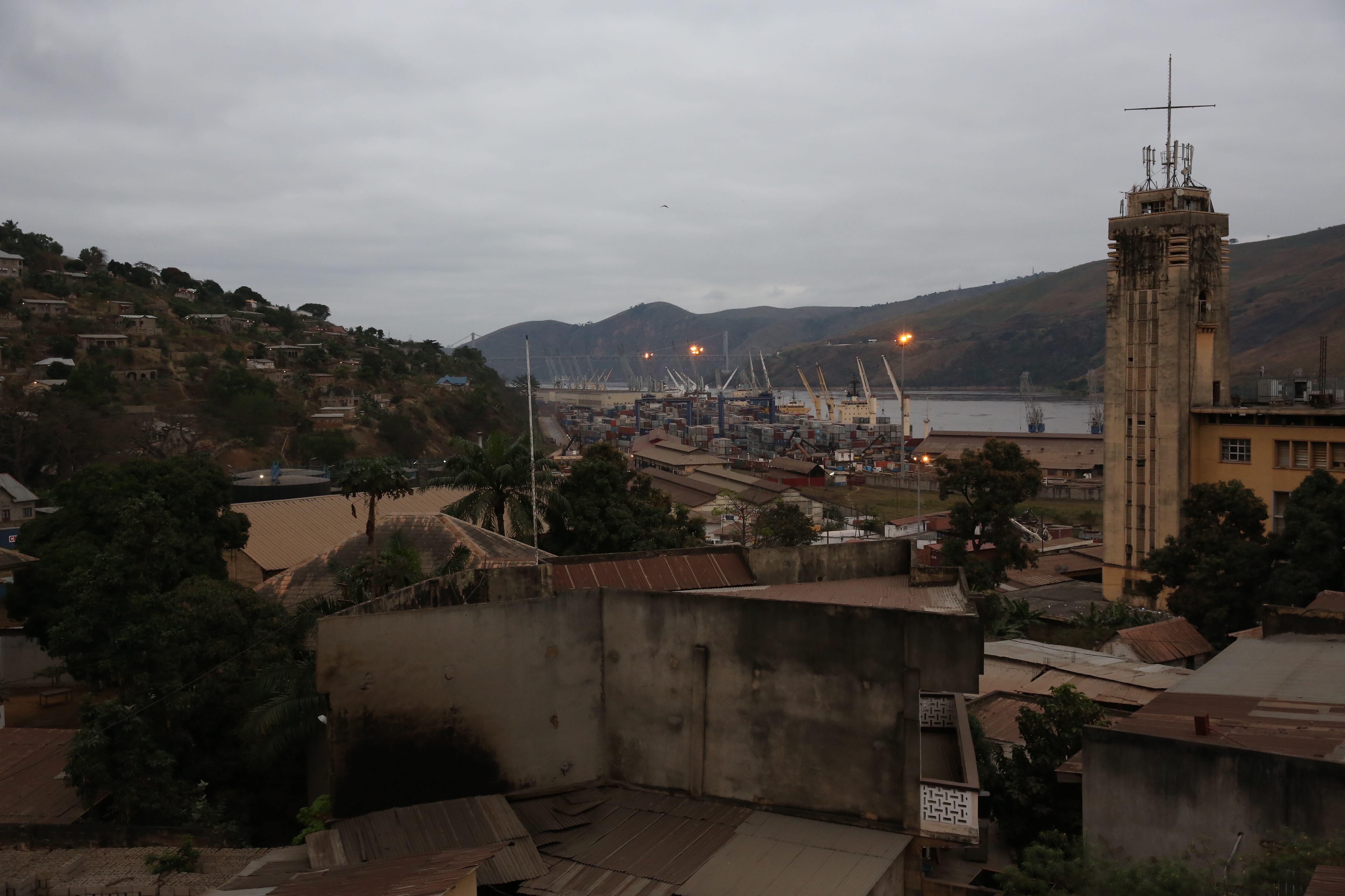 Photo MONUSCO / Abel Kavanagh